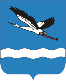 Герб городского поселения "Город Амурск" (Хабаровский край), 2011 год